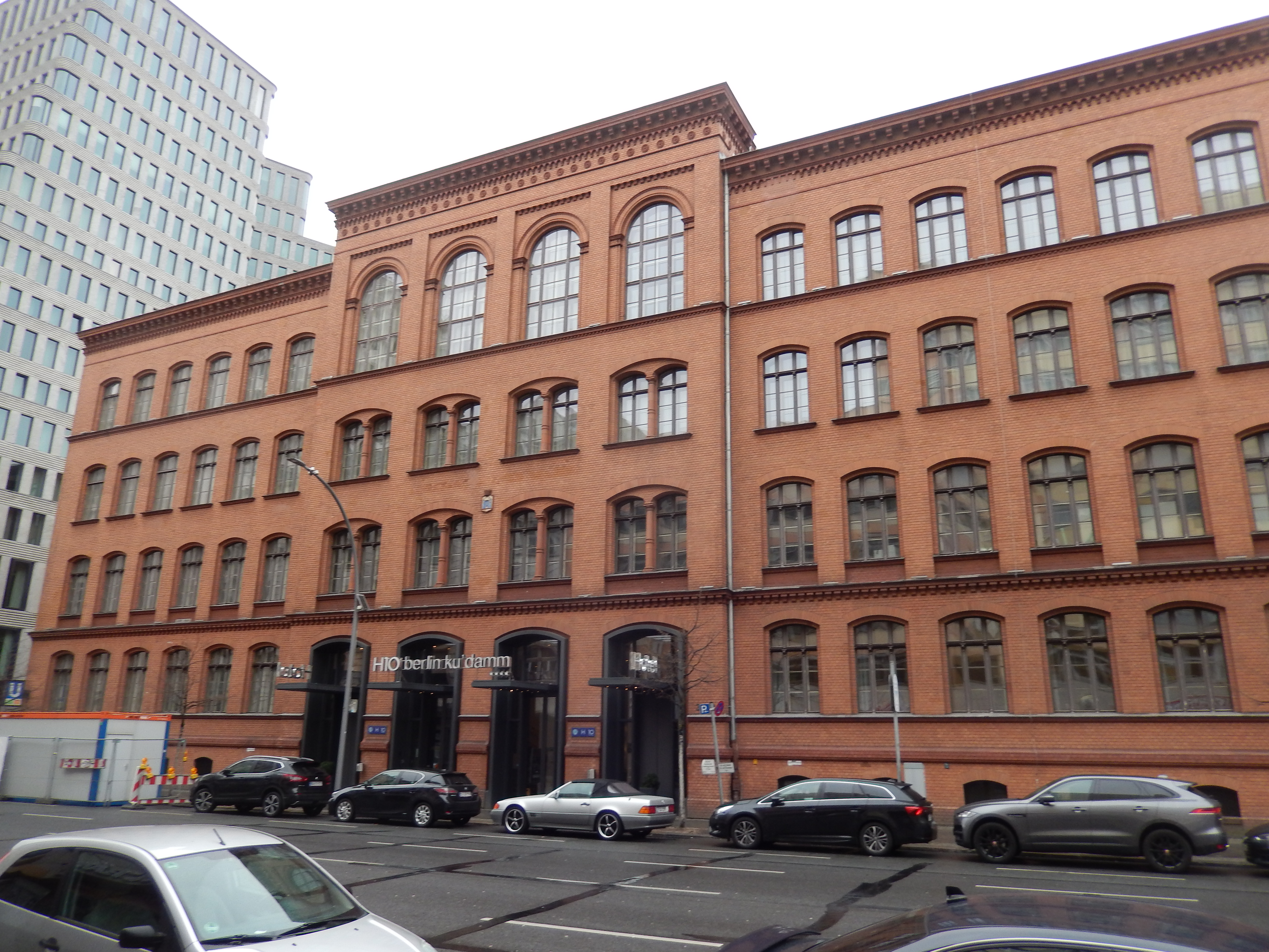 H10 Hotel berlin kudamm